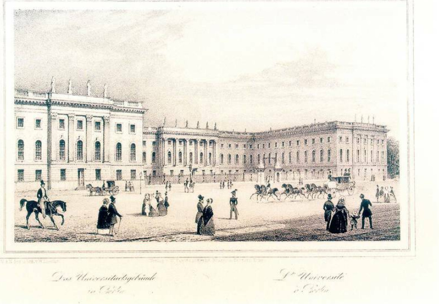 Lithographie der Berliner Universität, von Wilhelm Loeillot, 1845